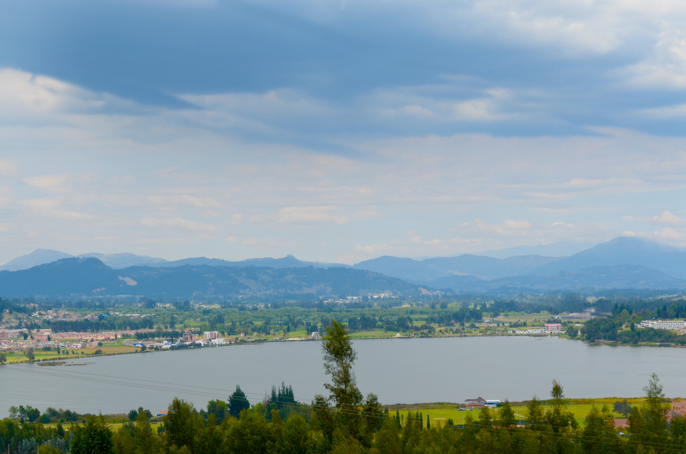 vista del lago sochagota